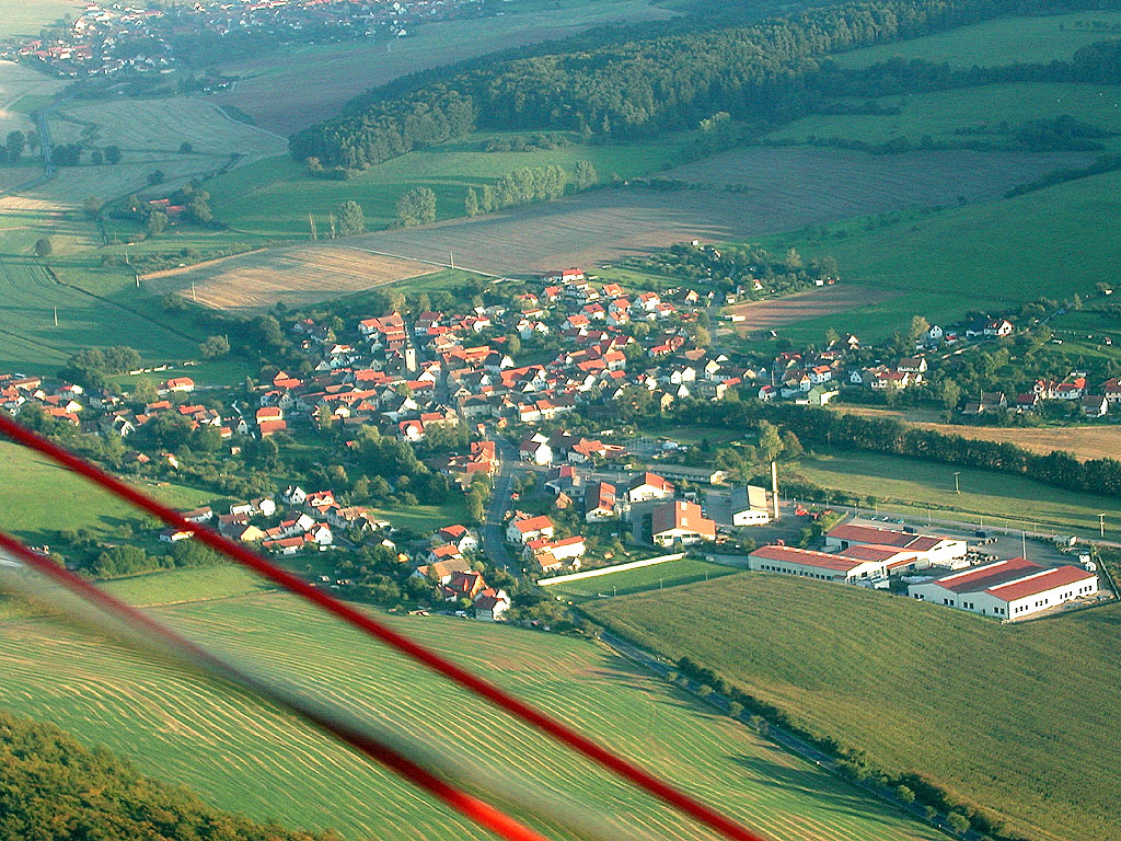 Luftaufnahme Neubrunn, aus Richtung Meiningen, im Hintergrund Jüchsen